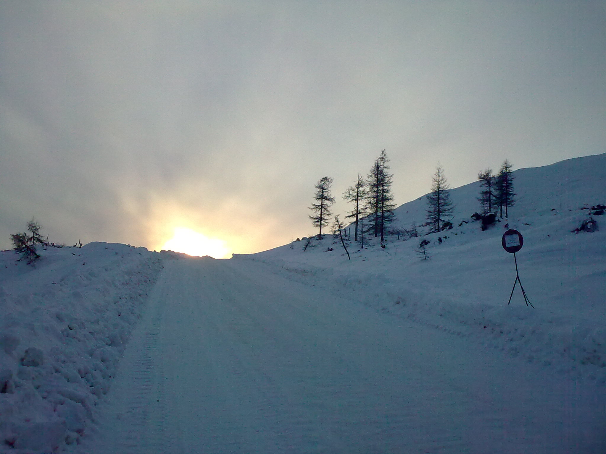 Зимняя дорога на Гольцовом